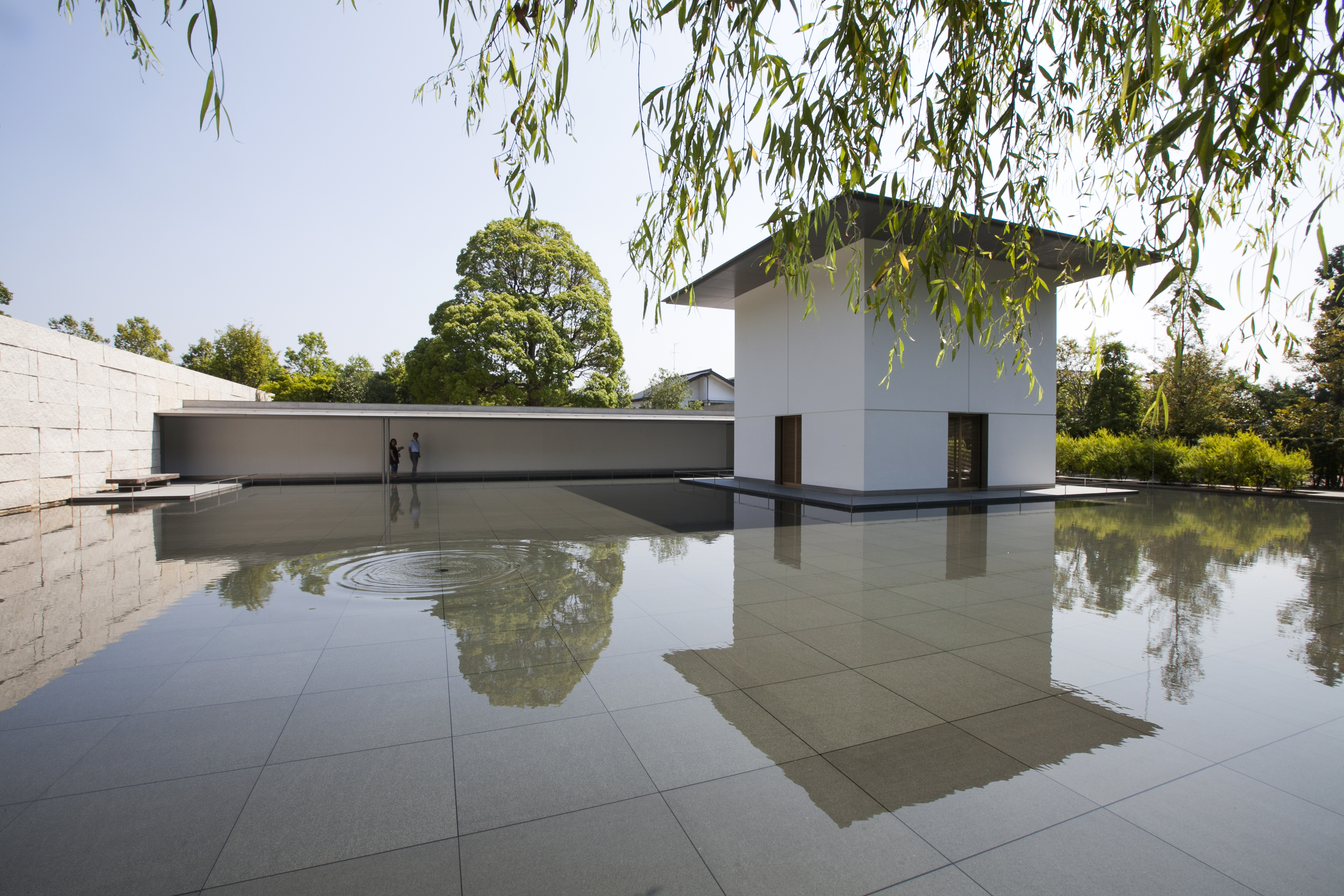 鈴木大拙館